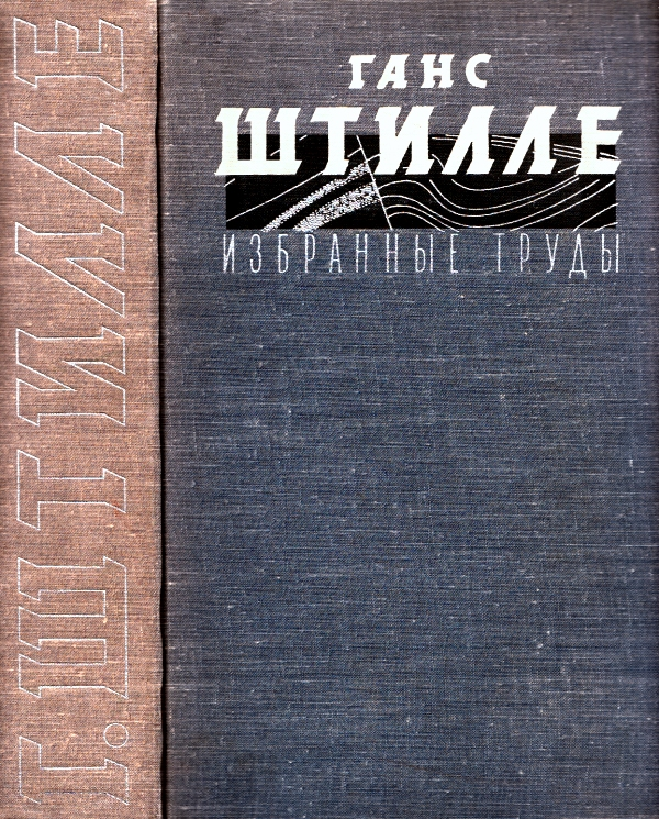 Обложка Штилле Г. В. Избранные труды. Москва: Мир, 1964. 887 с.